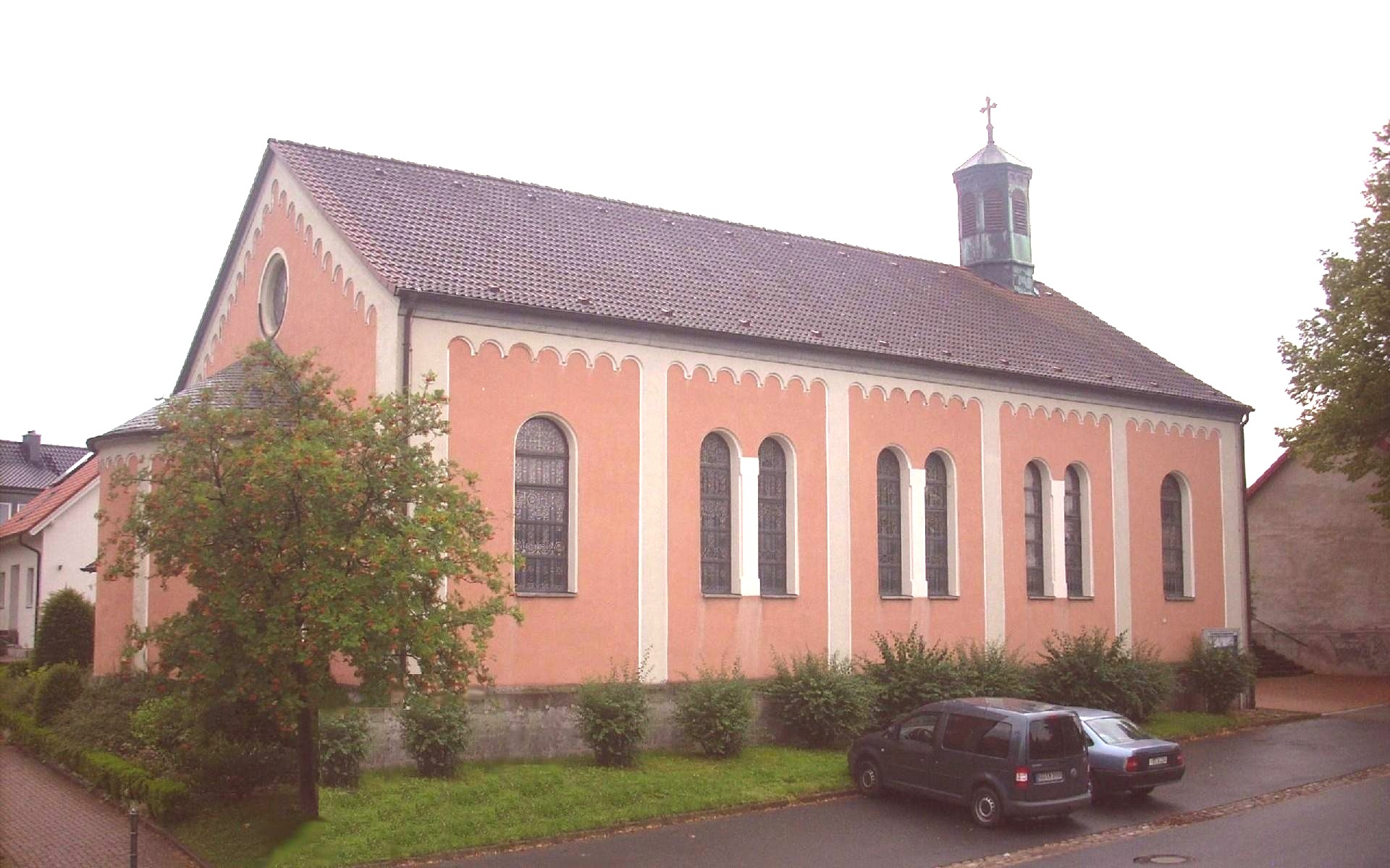 St. Mariä Himmelfahrt, Westfeld, von Nordosten